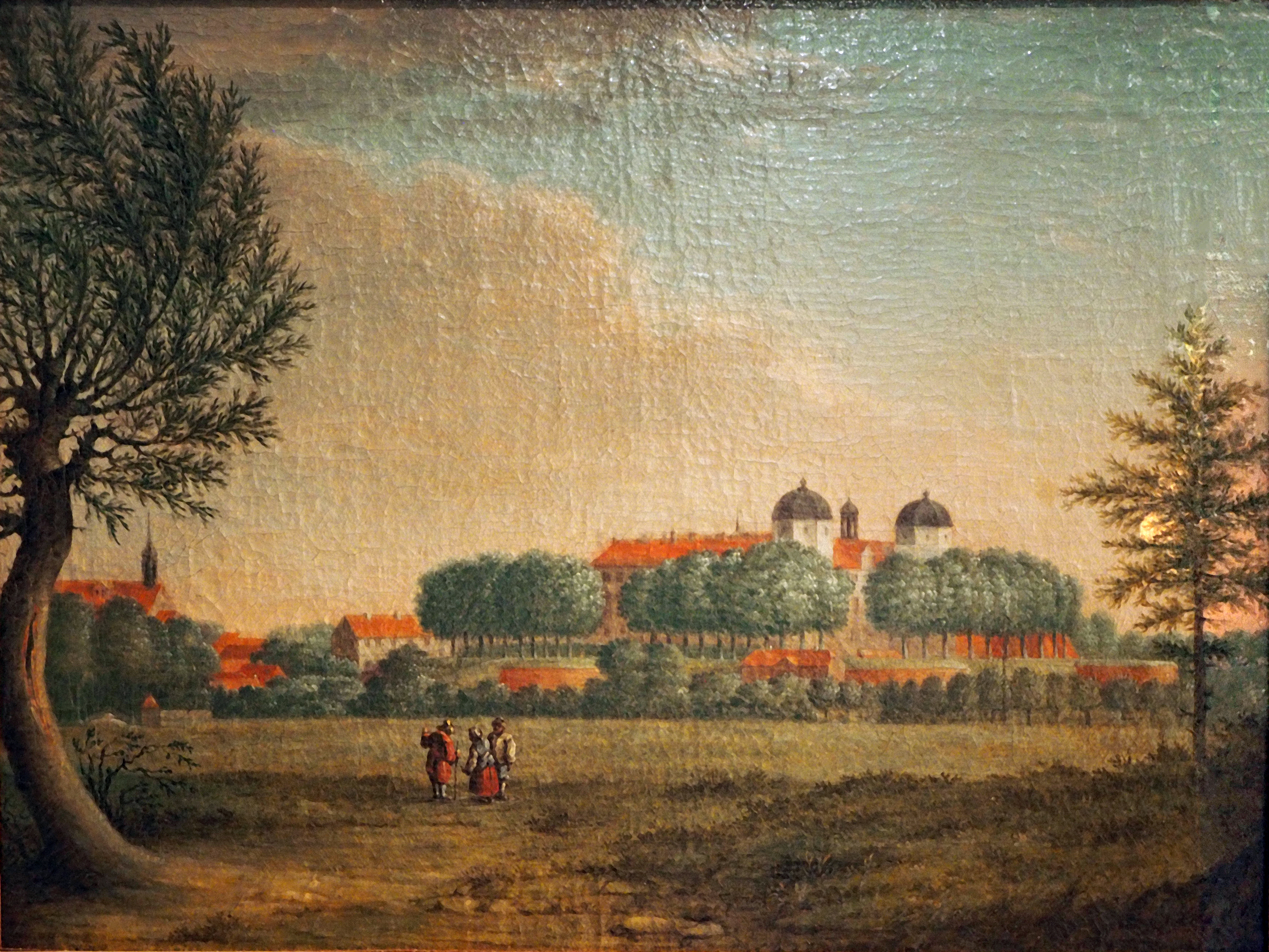 Das einzige bekannte Ölgemälde mit einer Ansicht des Celler Schlosses im 18. Jahrhundert zeigt den hohen, mit Bäumen bewachsenen Wall, der das Schloss umgab.